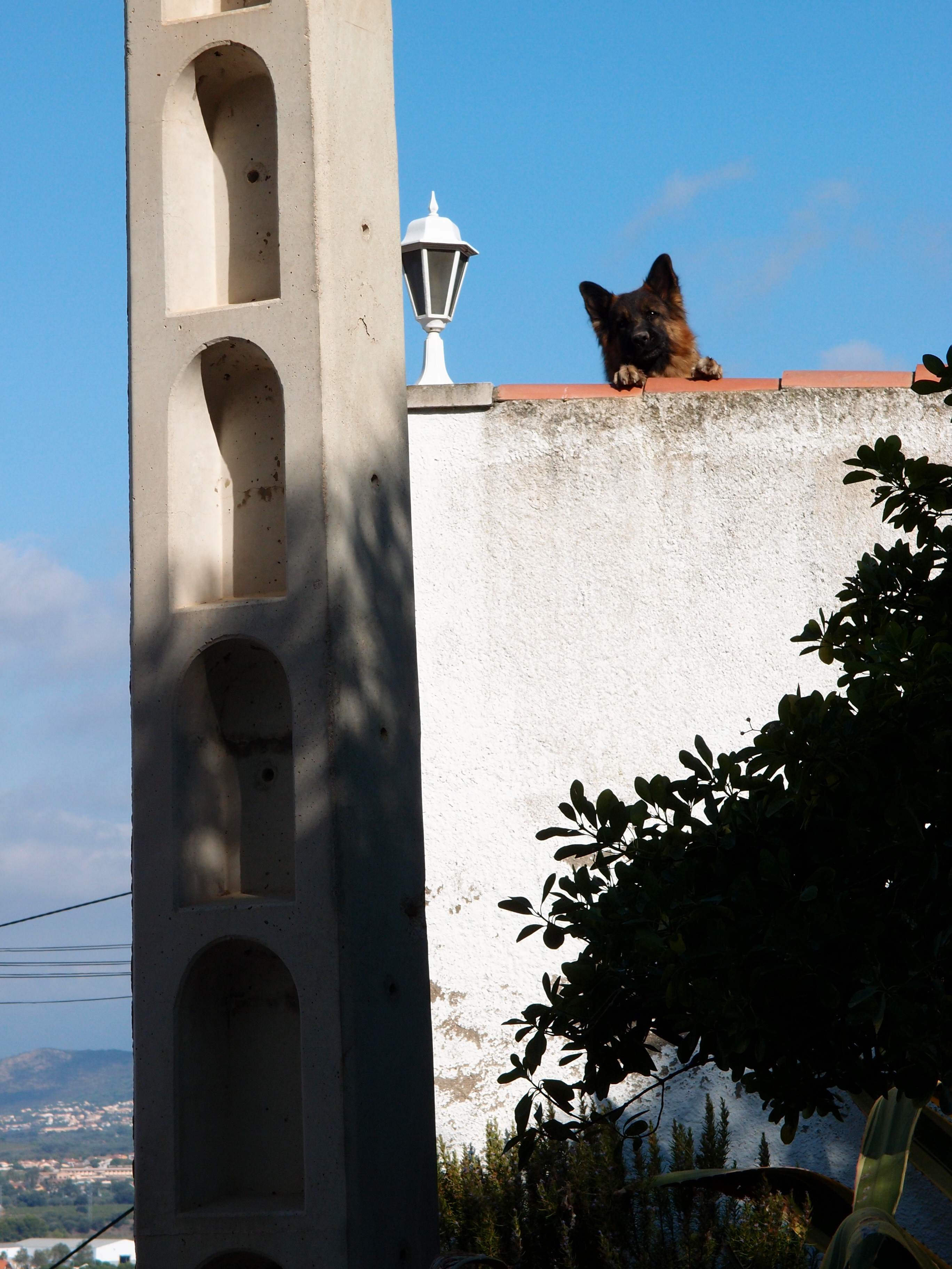 Ein Wachhund (Deutscher Schäferhund) auf seinem Beobachtungsposten Datum: 16.09.2011 Urheber: M. Pfeiffer alias Benutzer:Gordito1869 Quelle: Privates Fotoarchiv des Urhebers